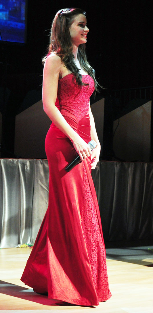 Nela Pocisková